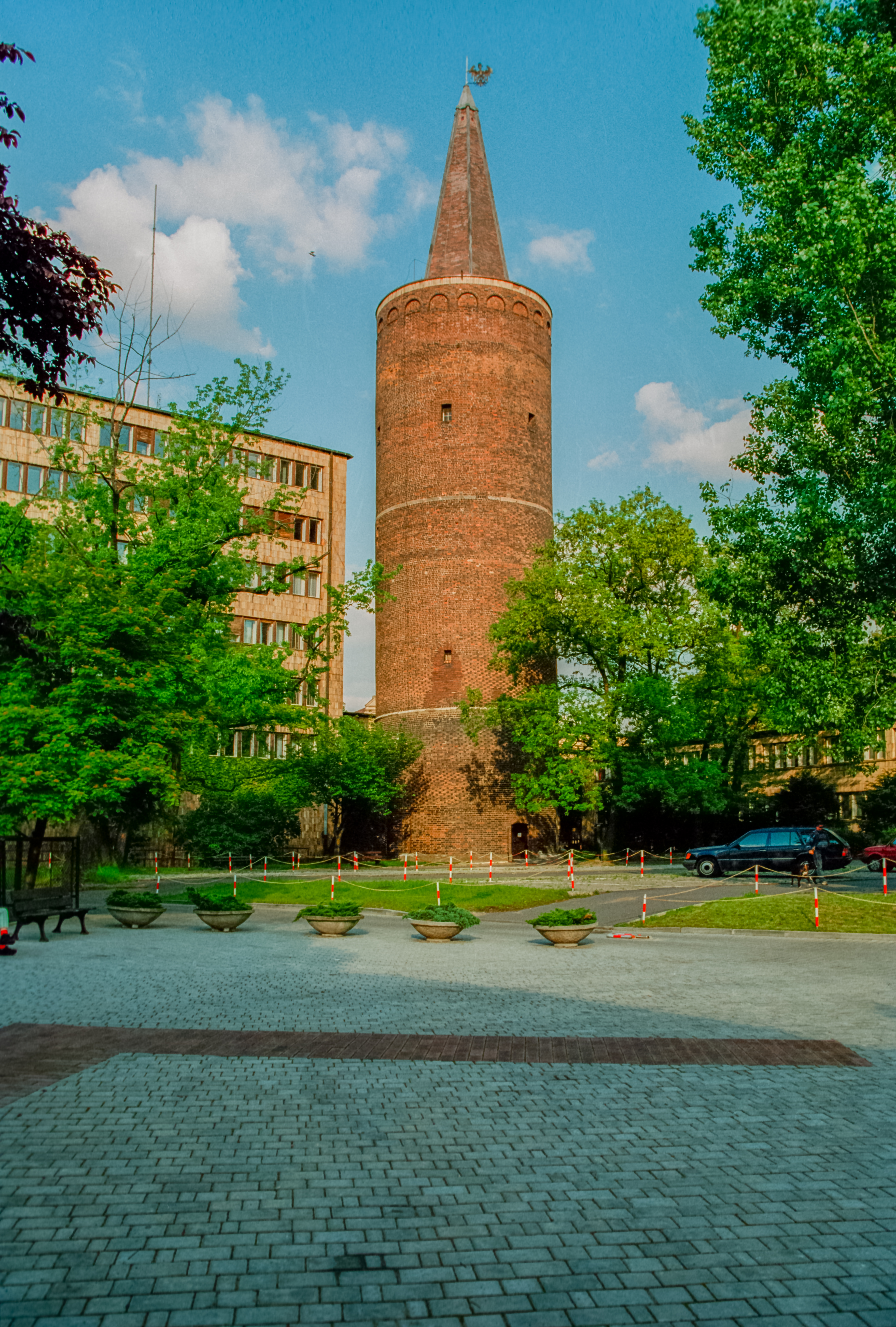 Opole